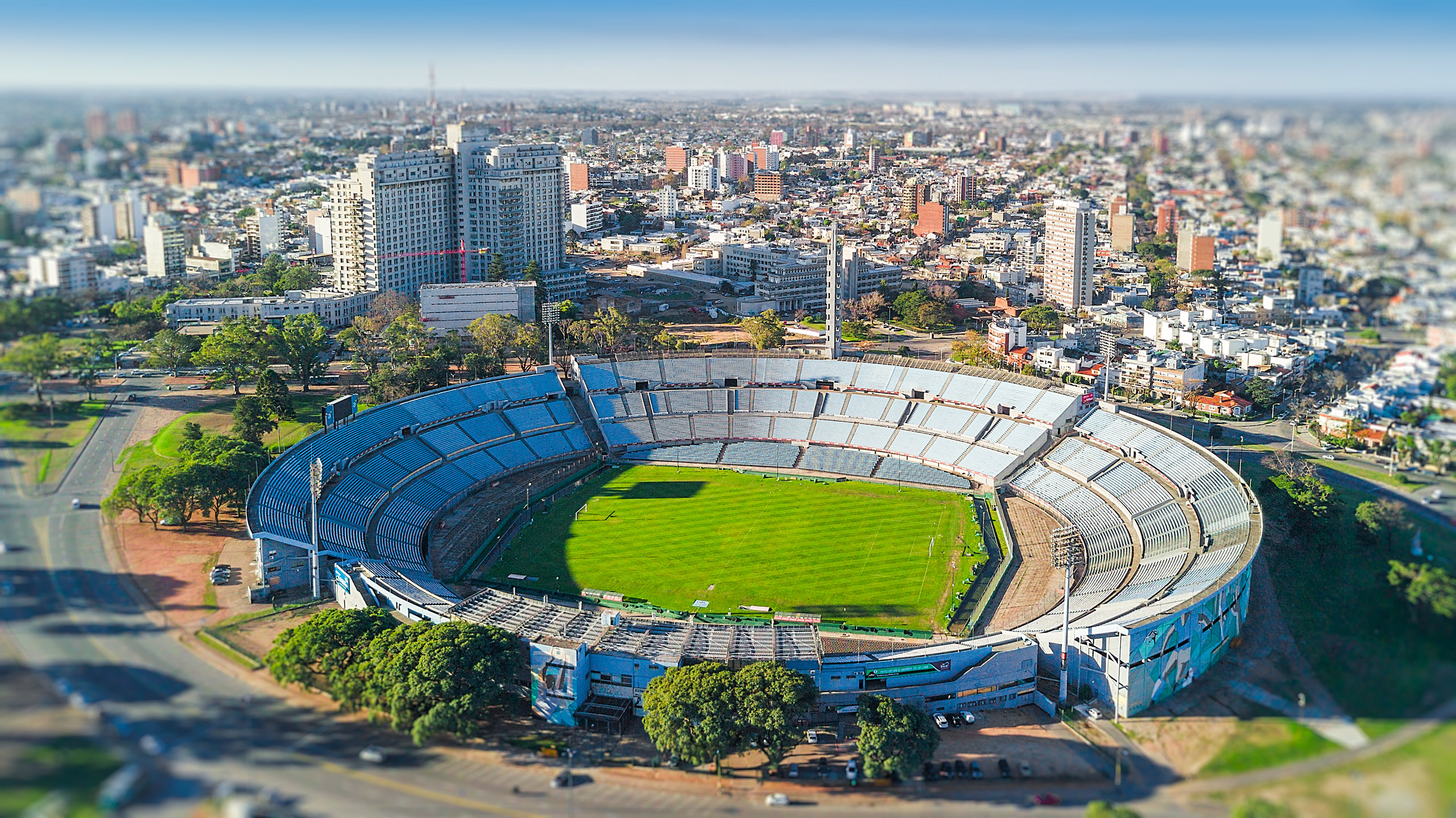 Montevideo